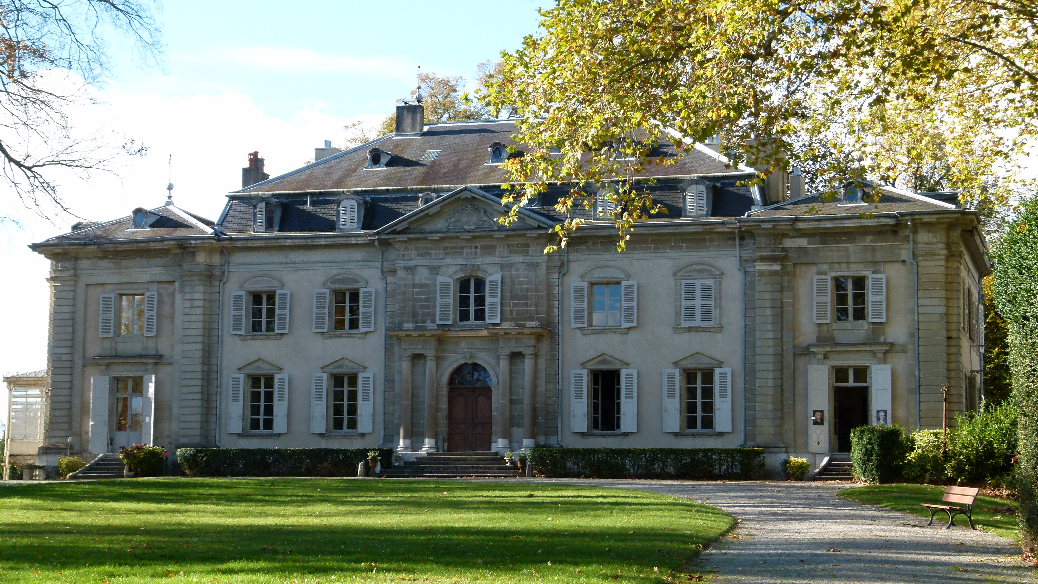 Château de Voltaire à Ferney